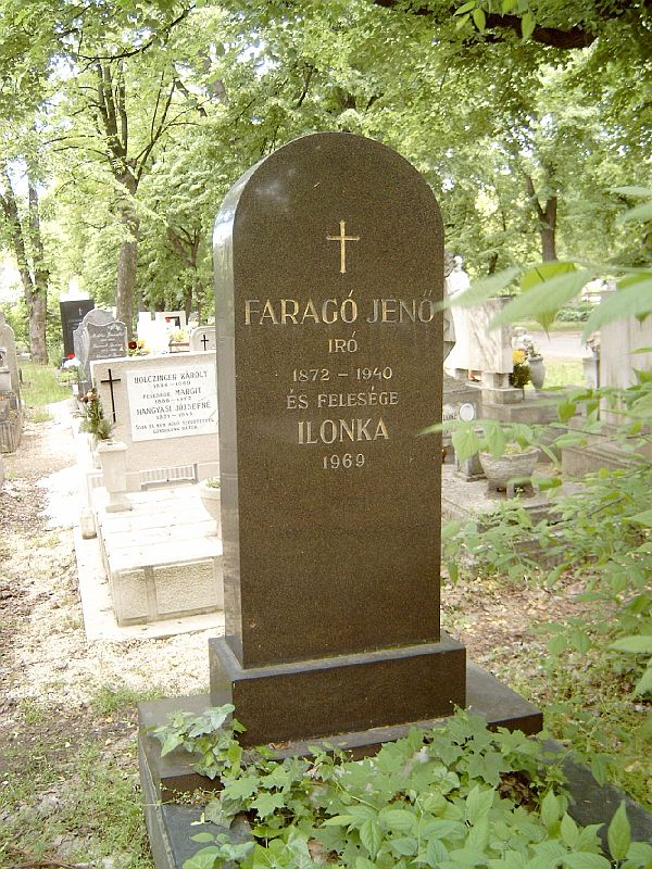 Faragó Jenő (Budapest, 1872. április 6. – Budapest, 1940. március 28.) író, újságíró sírja Budapesten. Új köztemető: 46/3-1-170.